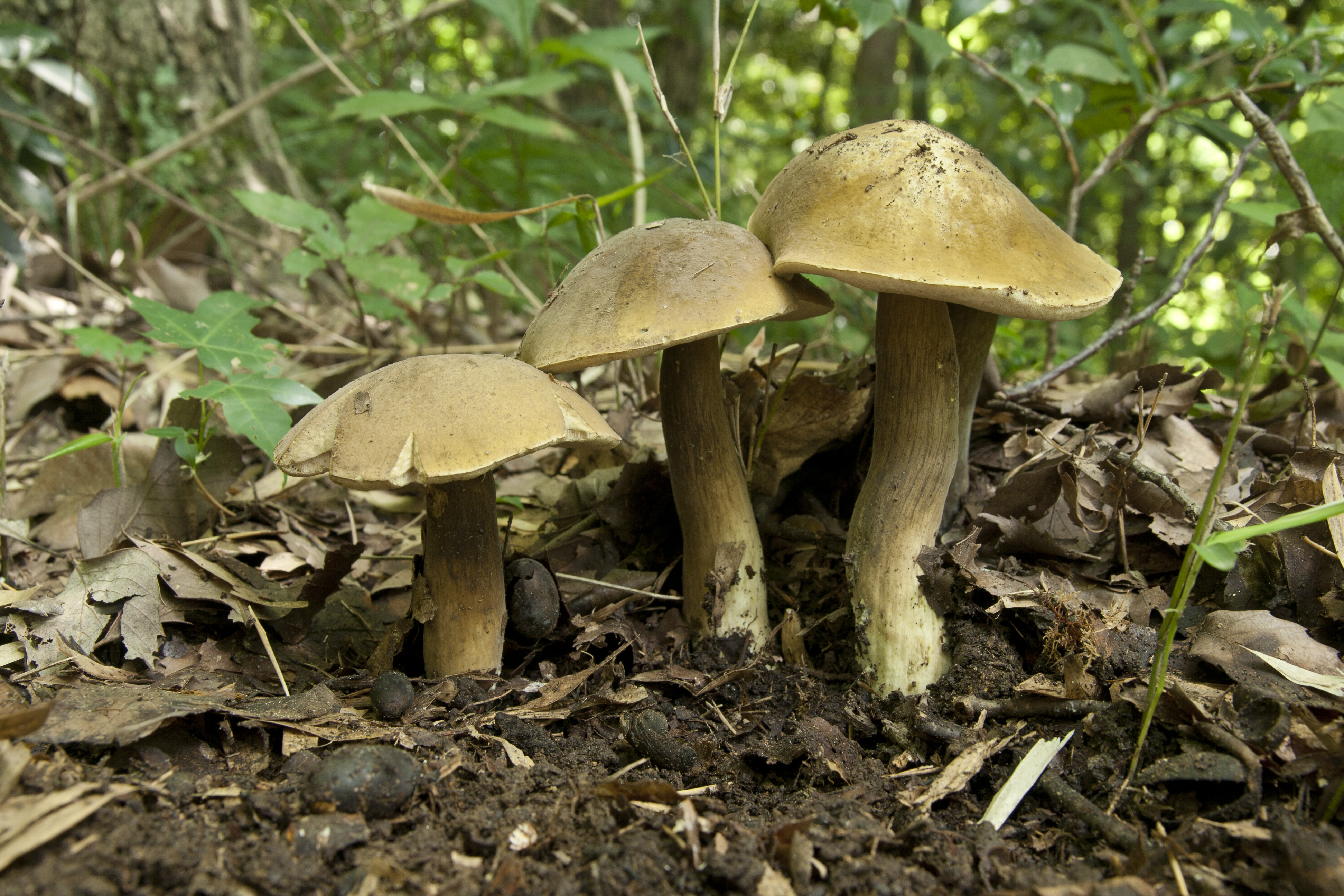 コビチャニガイグチ (学名:Tylopilus otsuensis)